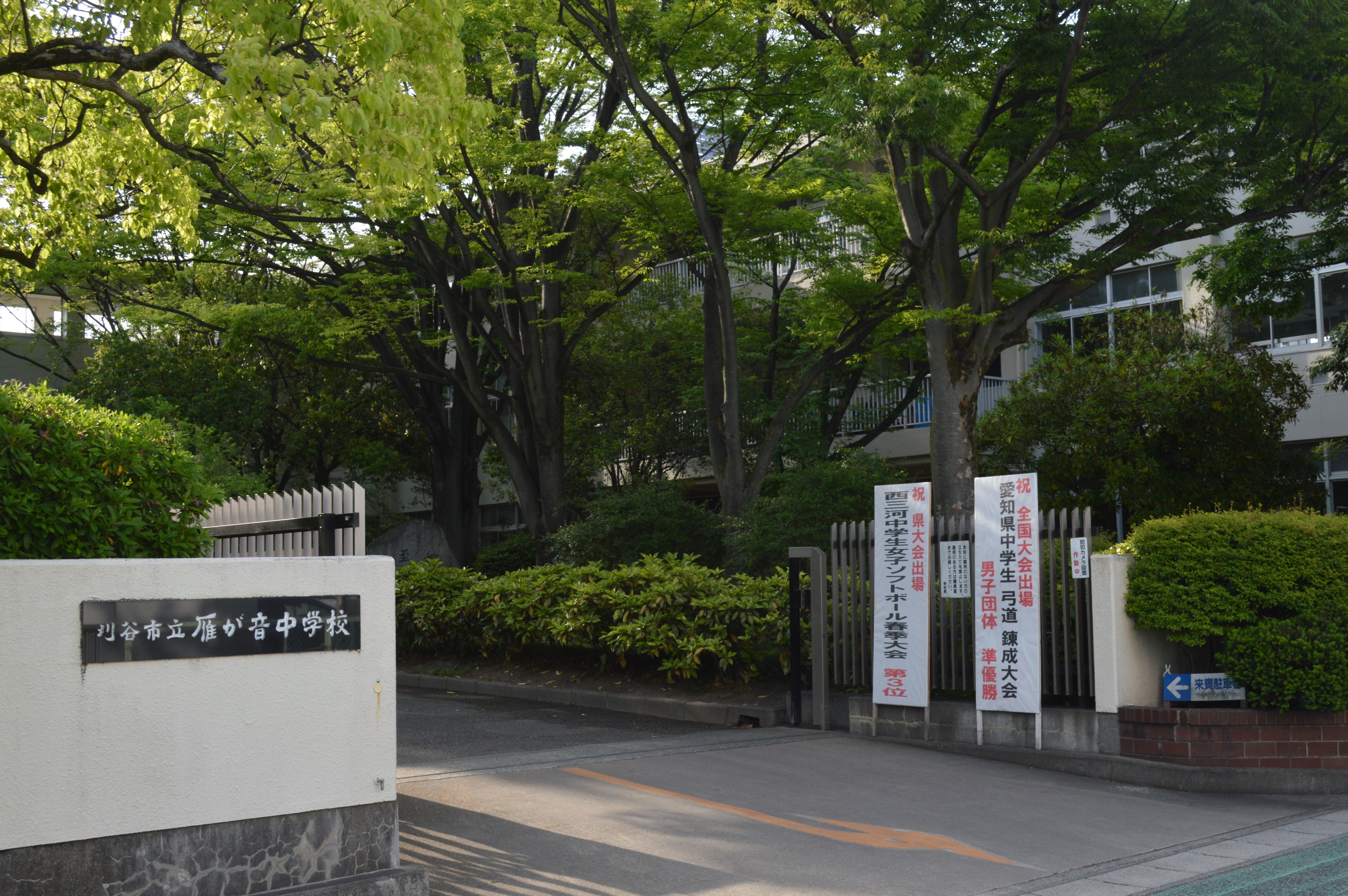 愛知県刈谷市築地町にある刈谷市立雁が音中学校。